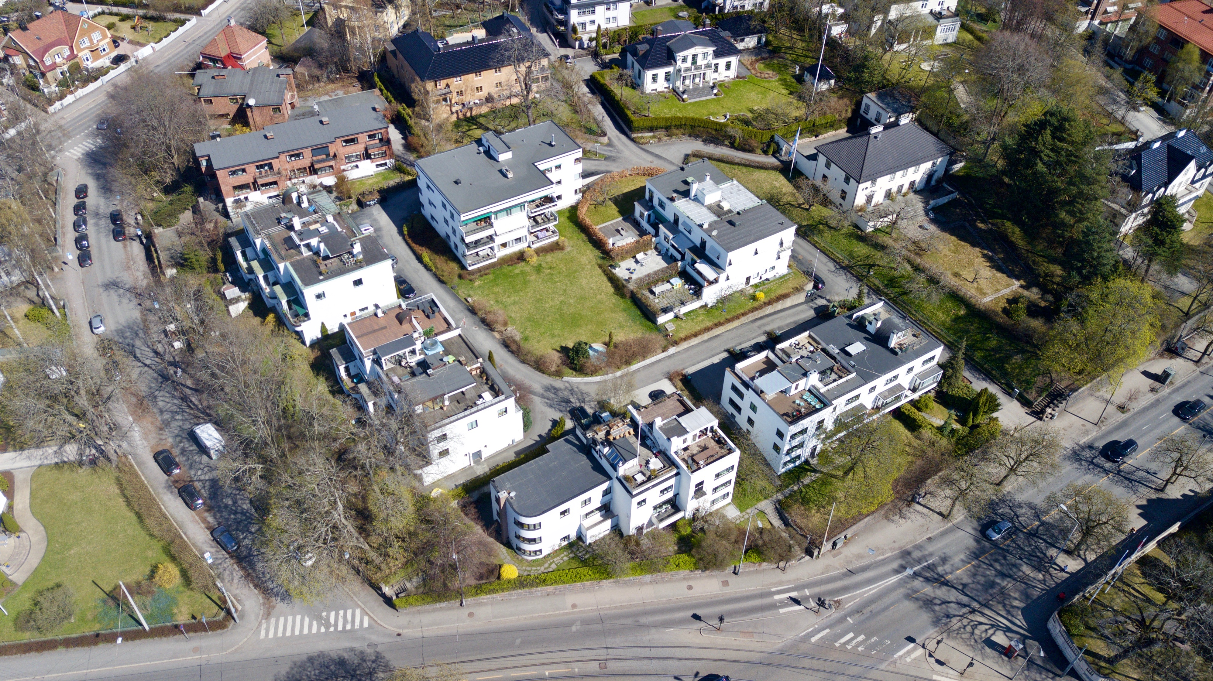 Boligkomplekset Heia i Oslo